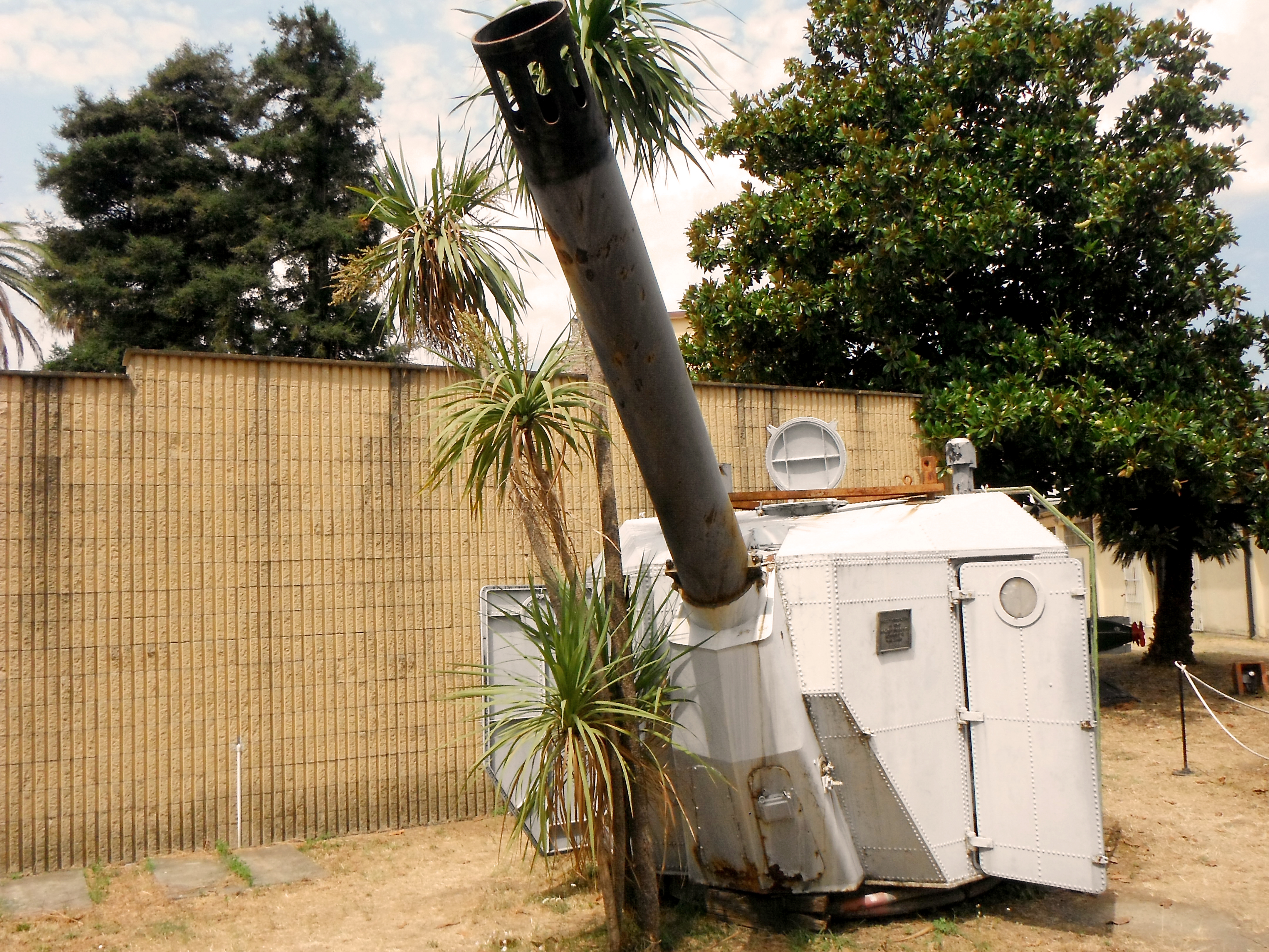 Lanciabas Menon K 113 Mod. 1960 imbarcato sulla fregata Alpino al museo tecnico navale di La Spezia